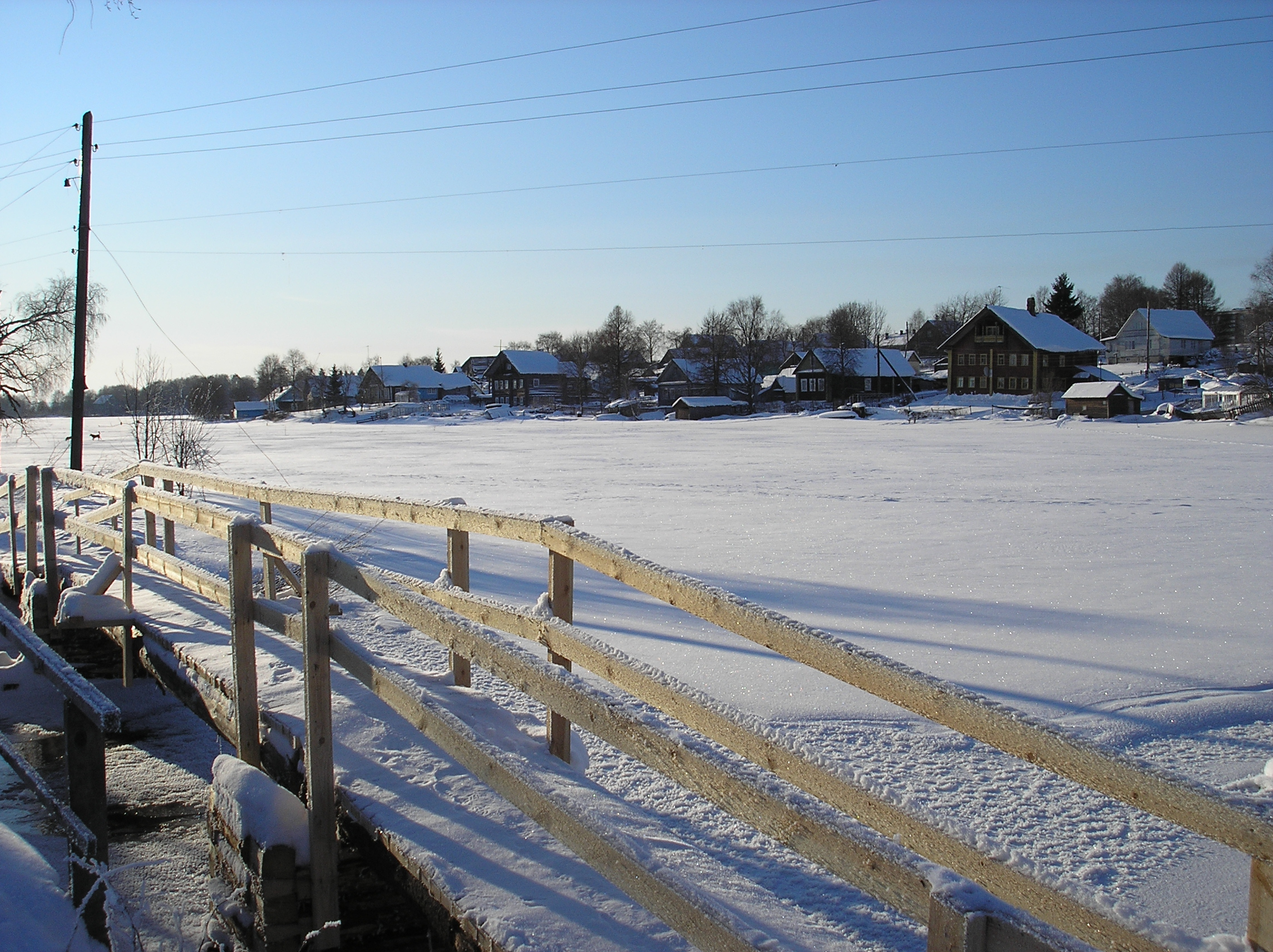 Село Святозеро. Республика Карелия. Россия